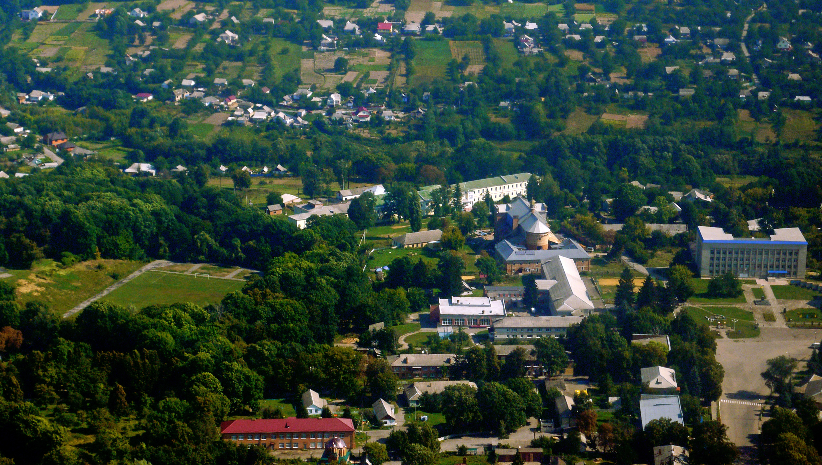 Садиба Ярошинських, Тиврів, вул. Леніна, 14